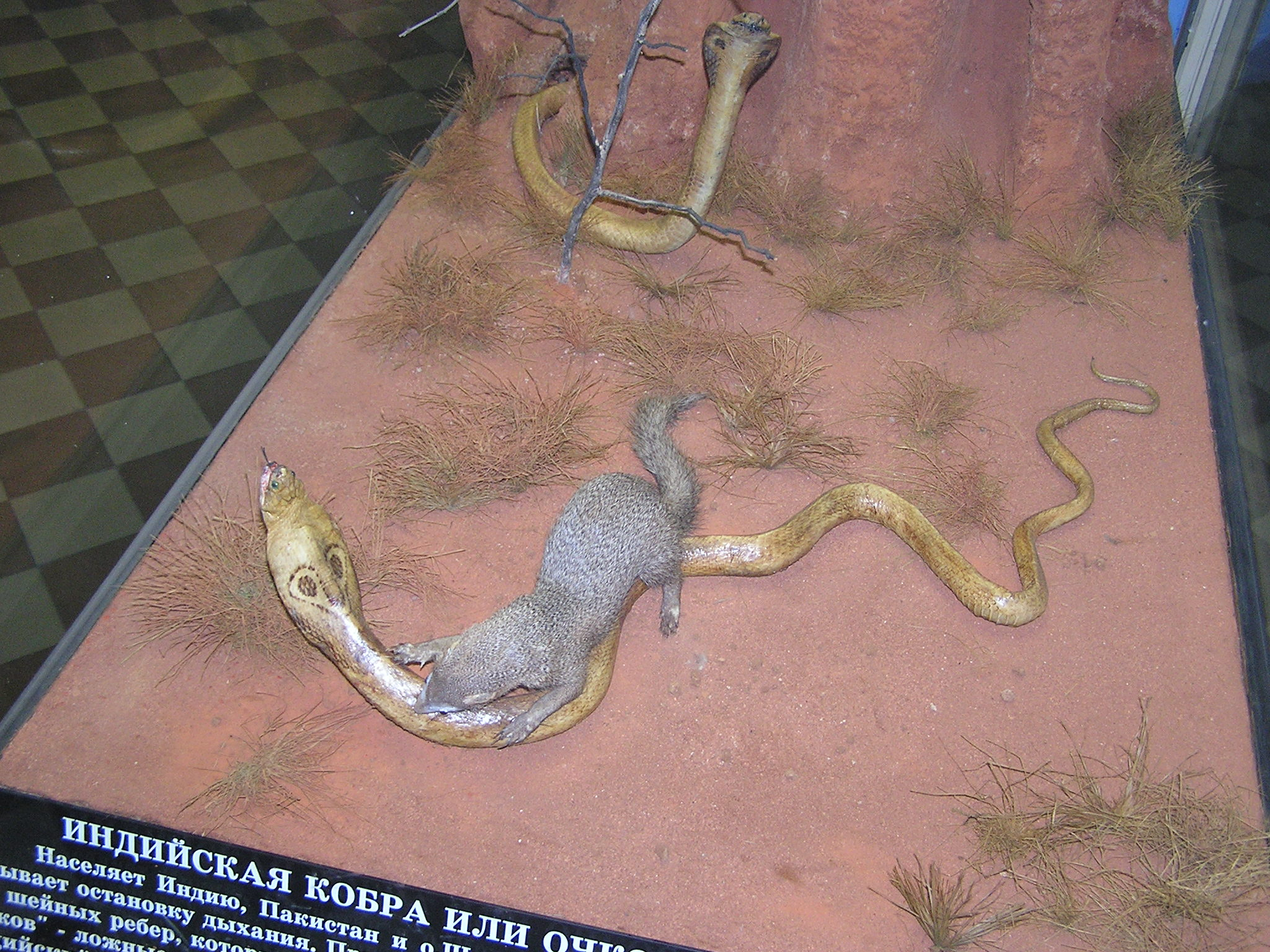 Зоологический музей в Санкт-Петербурге. Индийская кобра и мангуст